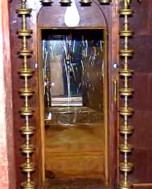 I Vaikunda Raja, took this photo graph.